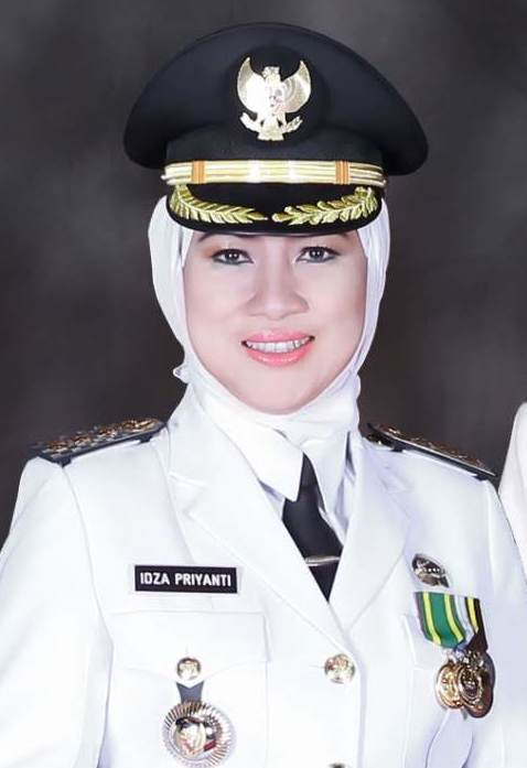 Bupati Brebes Idza Priyanti (Periode II)